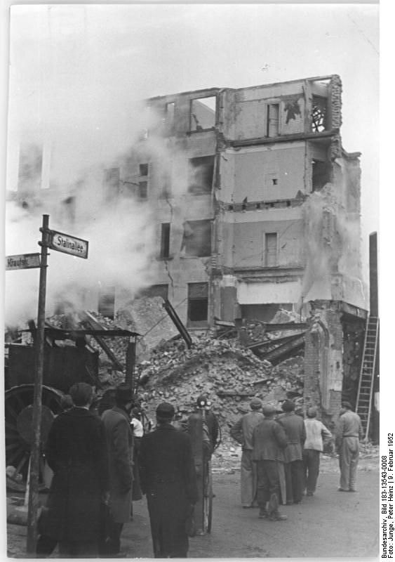 Zentralbild Junge 9.2.1952 Berlin ist ein grosser Bauplatz. Im Nationalen Aufbauprogramm von Berlin entstehen zu beiden Seiten der Stalinallee grosse Wohnbauten. Übersicht des Baugeländes. UBz: An der Stalinallee Ecke Krautstrasse werden alte Häuser und Ruinen eingerissen, um Platz für die Neubauten zu schaffen.